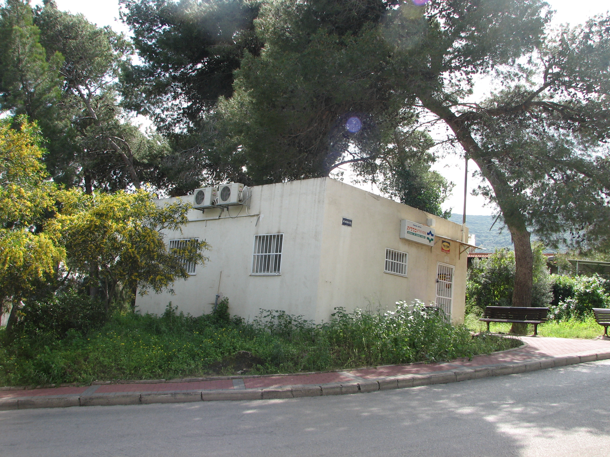 Nesher The City Nesher on Mount Carmel and Suburb:Givat Nesher תמונות משכונותיה של העיר נשר, גבעת נשר, מרפאת נשר של קופת חולים הכללית